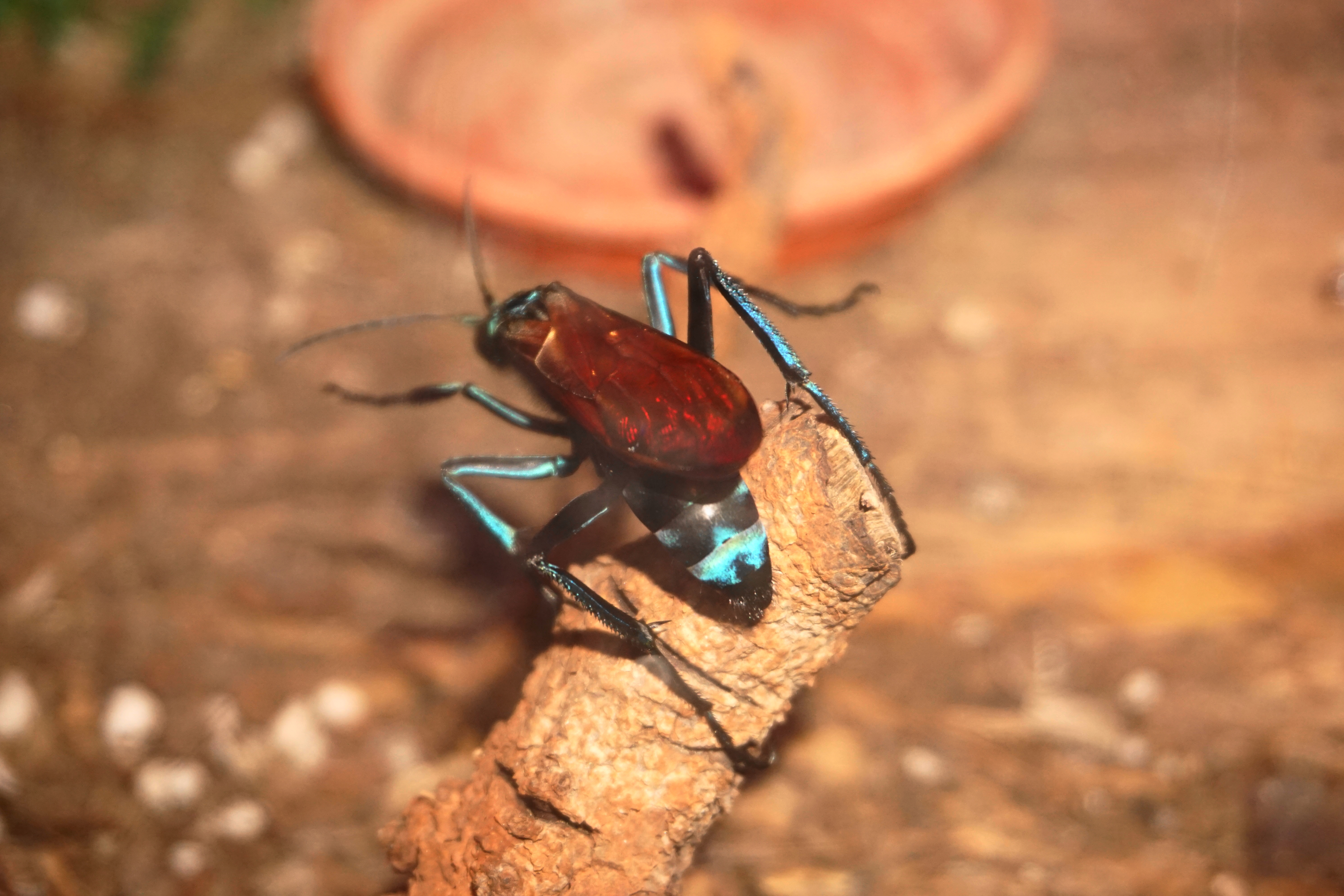 En esta imagen ,podemos observar los colores de esta avispa